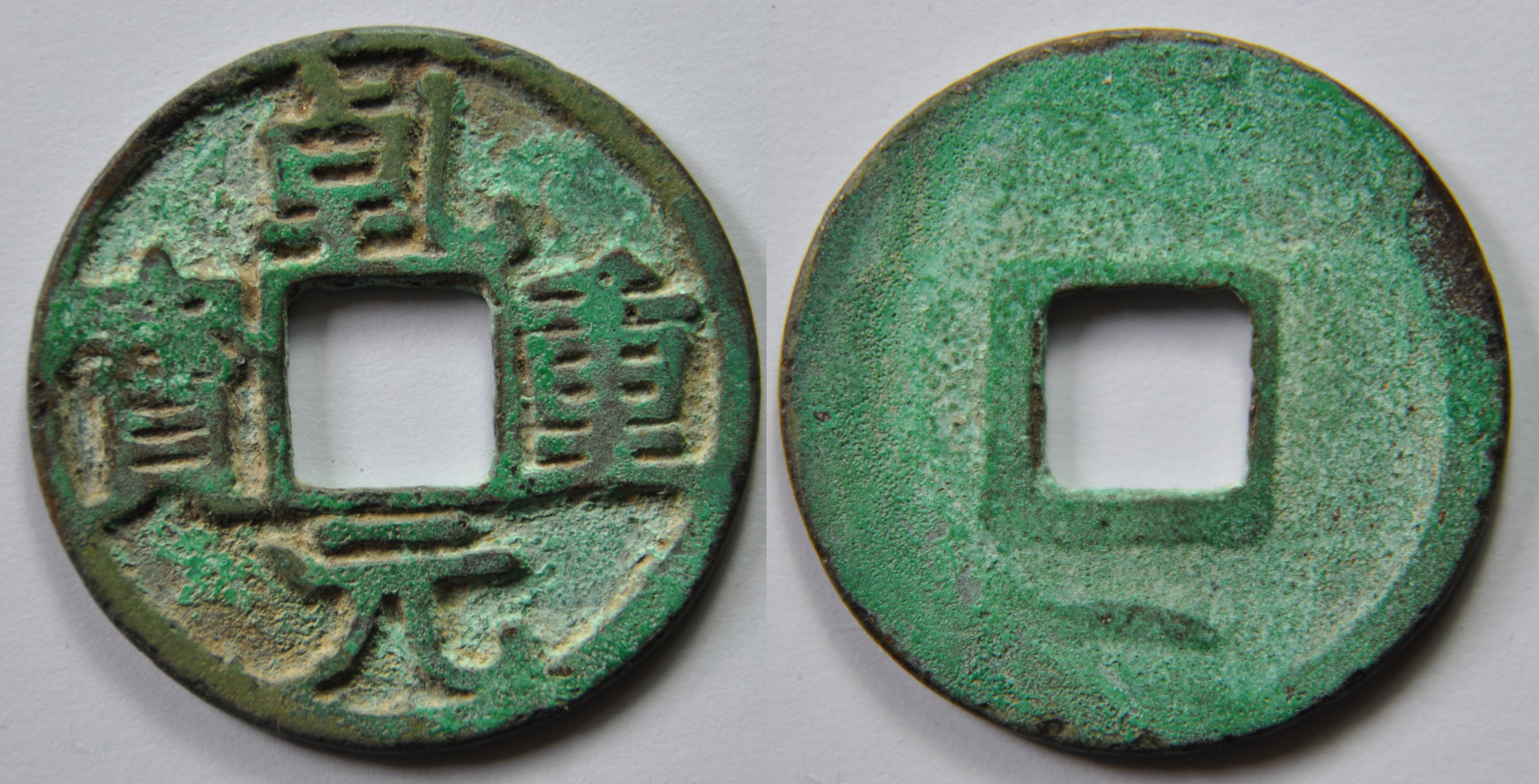 Une monnaie en bronze de 10 sapèques de l'empereur Su Zong (756-762) de la dynastie Tang (618-907), ère Qian Yuan. A/ Qian Yuan zhong bao (Monnaie lourde de Qian Yuan) R/ croissant en bas Dimension : 24,3 mm Poids : 3 g. Remarque : Les monnaies Qian Yuan zhong bao ont été fondues à partir de 758-759 (1ère année de l'ère Qian Yuan) pour une valeur de 10 sapèques (10 cash). Elles faisaient environ 30 mm pour 8 g. Mais très vite, il y a quantité de contrefaçons ne respectant pas la taille ni le poids. C'était évidemment puni de mort, par bastonnade. Cette monnaie est une contrefaçon de type III de bonne facture. Elle ne pèse pas plus lourd qu'une monnaie normale. Par contre, elle a un croissant au revers. On ne sait ce que signifiait ces marques. Le rebord est fin. Elle se différencie de la H14.114 par le caractère Qian écrit différemment ainsi que yuan. Référence : H14.116 ; Thierry Type III Indice de rareté : 14 (Commune) d'après D. Hartill